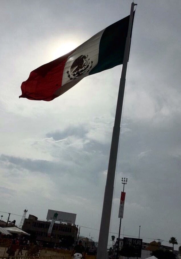 La Bandera izada en medio de la plaza